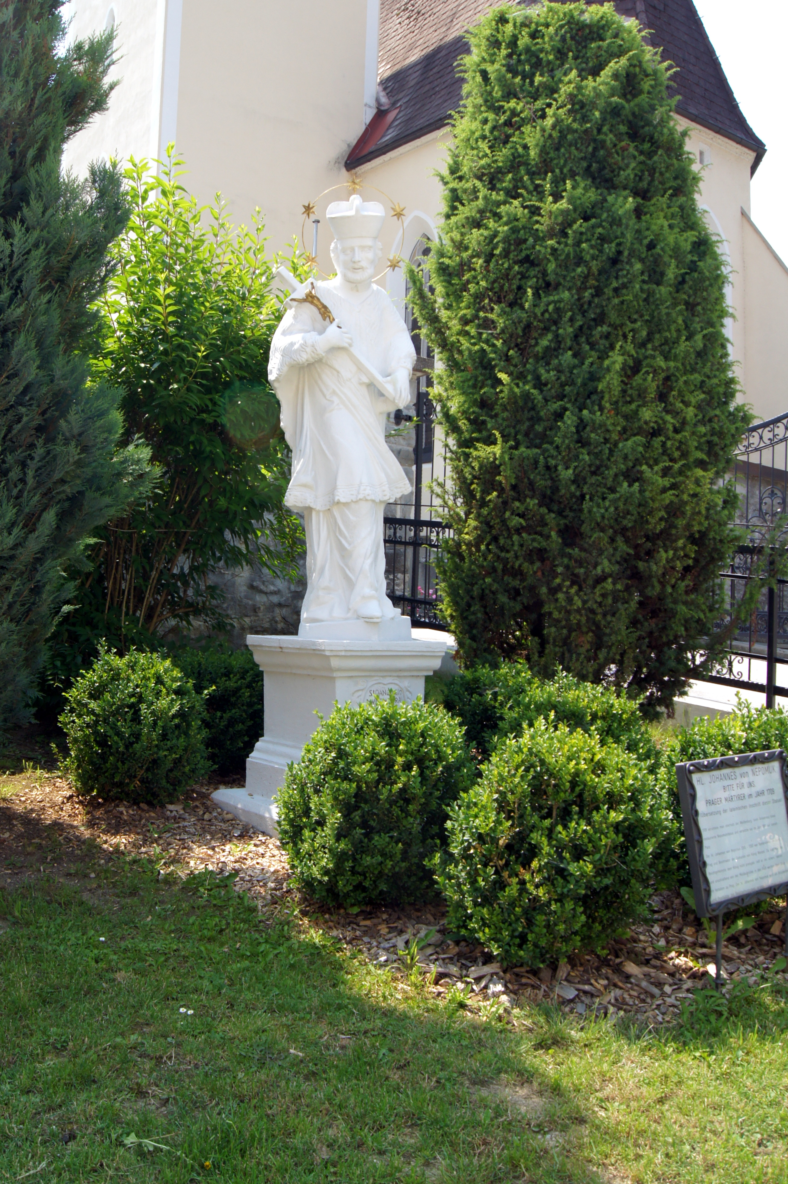 Figurenbildstock hl. Johannes Nepomuk